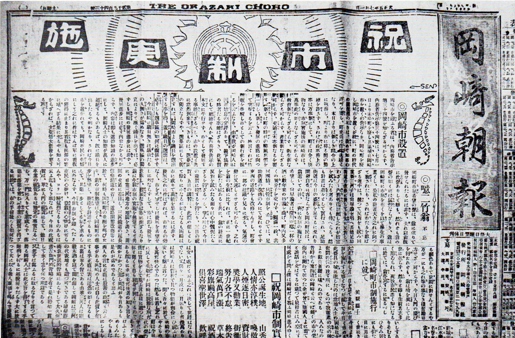 『岡崎朝報』1916年7月1日号